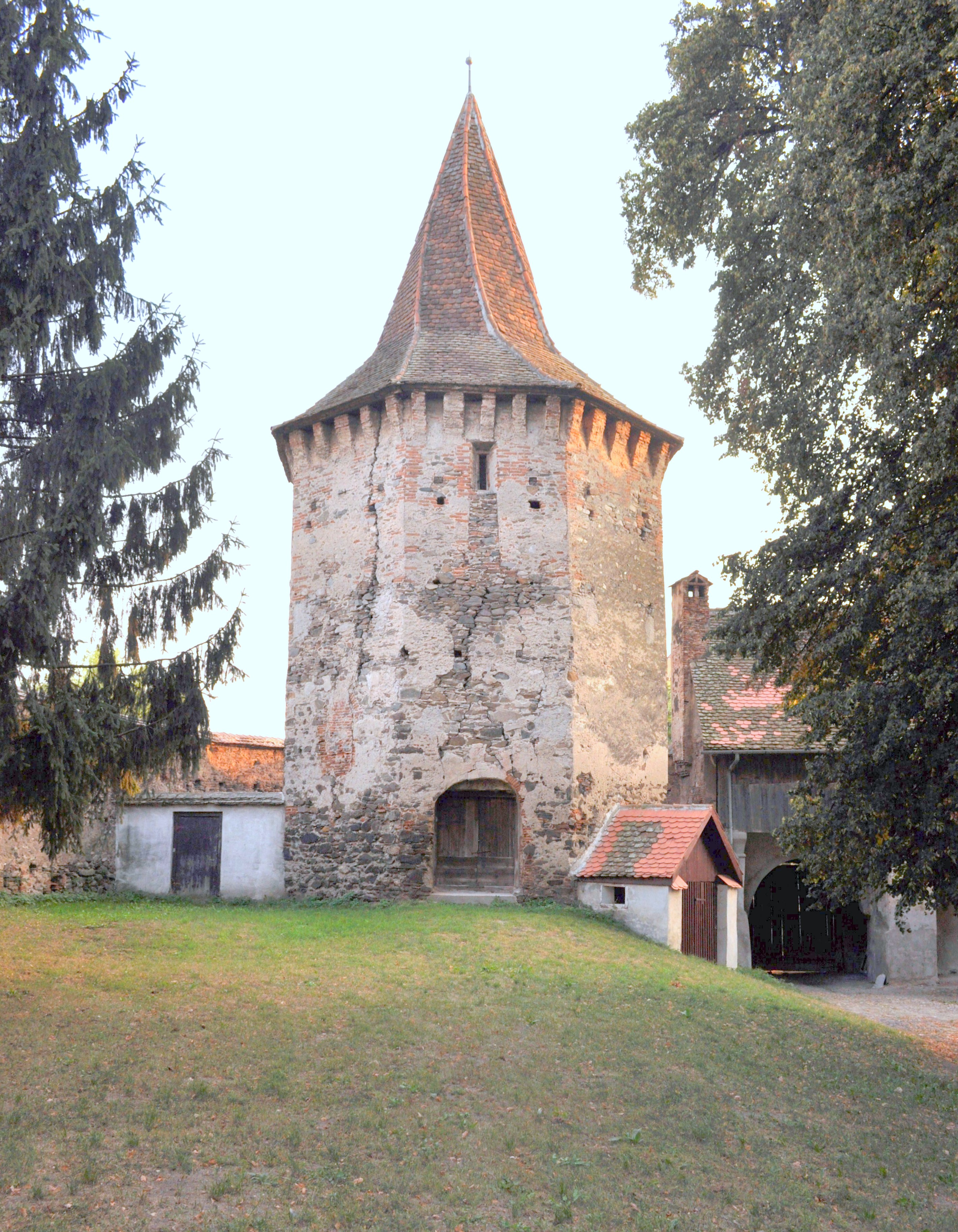 Biserica evanghelică din Cristian, județul Siniu 03